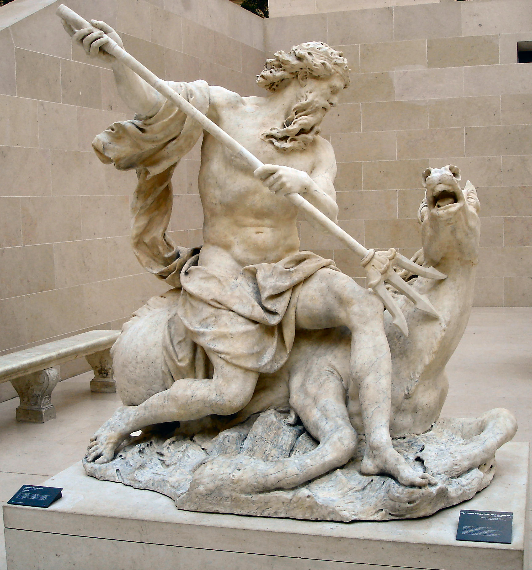 Neptune, Antoine Coysevox (Lyon, 1640 - Paris, 1720) Marbre H. : 1,85 m. ; L. : 1,77 m. ; Pr. : 1,11 m. Neptune, dieu de l'océan, un des quatre groupes commandés pour la "rivière" du parc de Marly, faisait pendant au bas de la cascade à la statue d'Amphitrite. Le modèle en plâtre est mis en place en 1699, et le marbre exécuté en 1705. Saisi au parc de Marly en 1796, le groupe ira décorer une fontaine à Brest en 1801. Dépôt des Monuments historiques, 1966 Département des Sculptures R.F. 3006